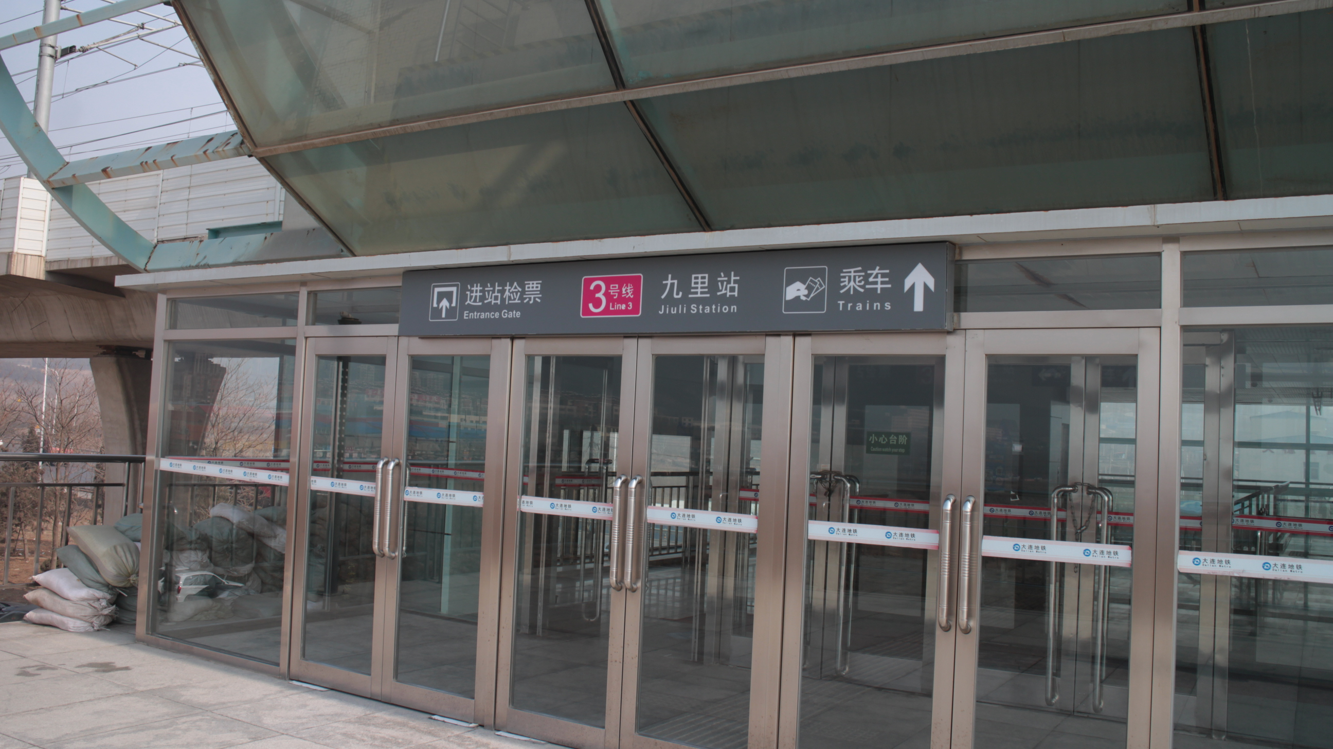 九里駅駅舎